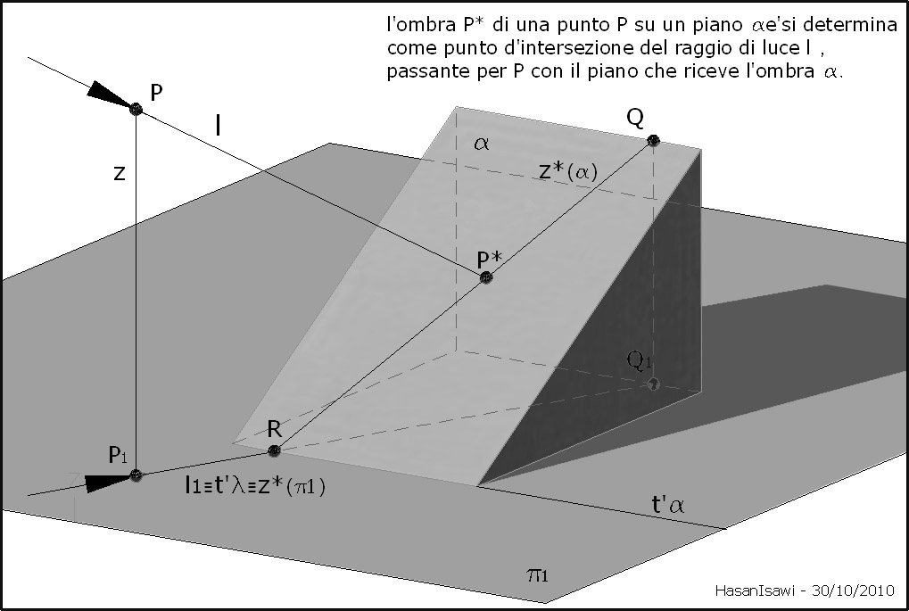 L’ombra di un punto P su un piano generico alfa si determina come punto d’intersezione del raggio luminoso passante per P con il piano che riceve l’ombra alfa. per determinare l'ombra del punto P bisogna comprendere e seguire in ordine la seguente procedura generale : 1- si fa passare per il punto P* un raggio luminoso l. 2- si fa passare per l un piano ausiliario verticale b*, 3- si detrmina la retta d'intersezione s tra i piani alfa e beta 4- in ultimo si individua il punto d'intersezione tra le rette r ed s.